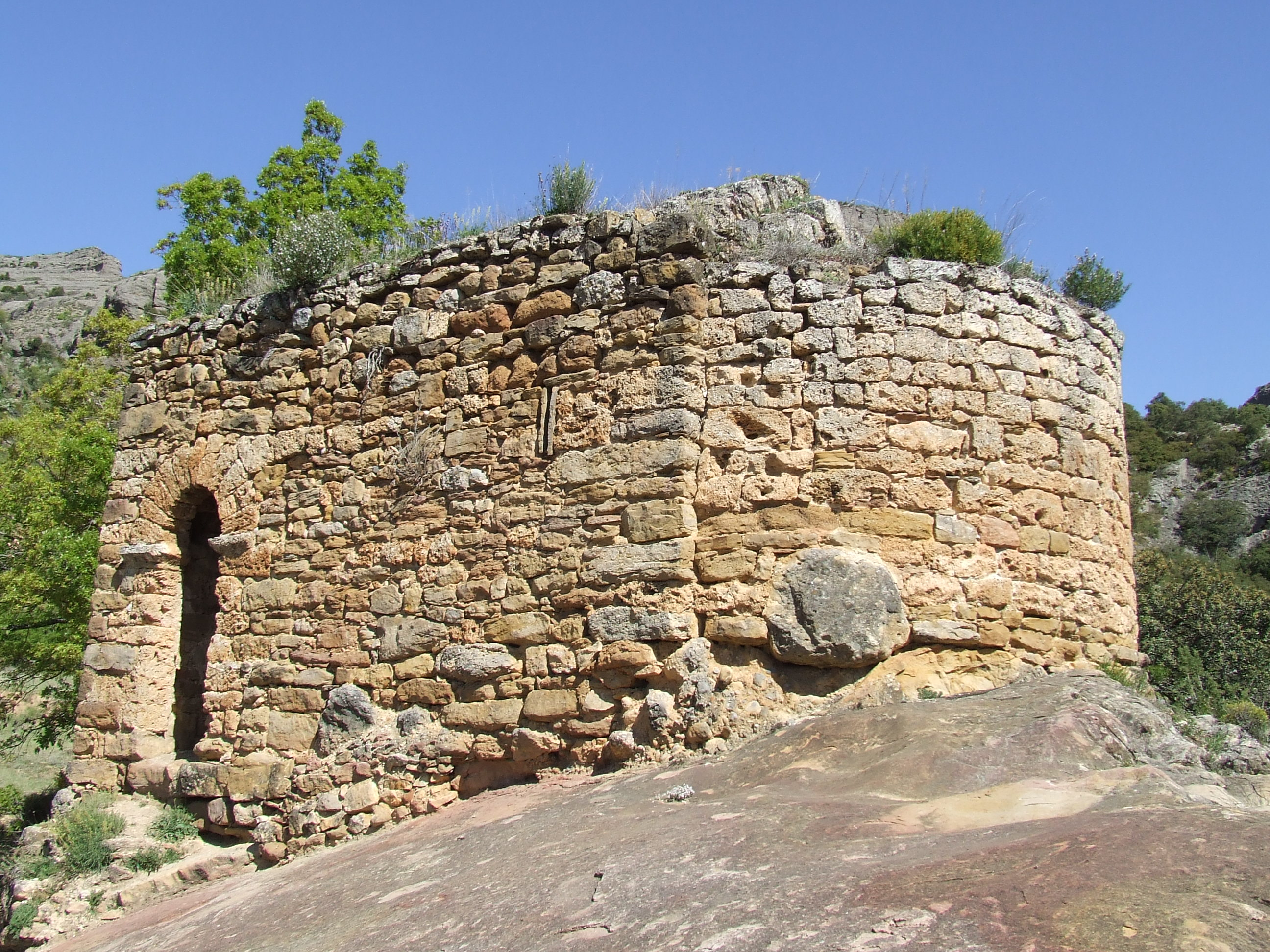 Sant Martí de Gurp des del sud-est (Gurp de la Conca, Tremp, Pallars Jussà)